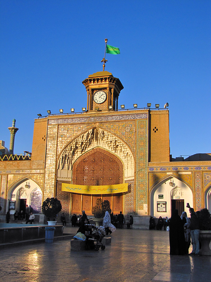 آستانه حضرت عبدالعظیم و بقاع متصل آن